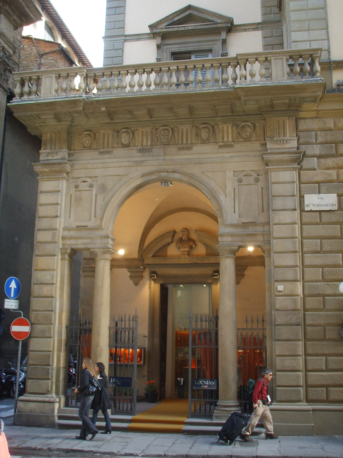 Palazzo tornabuoni, loggetta del cigoli